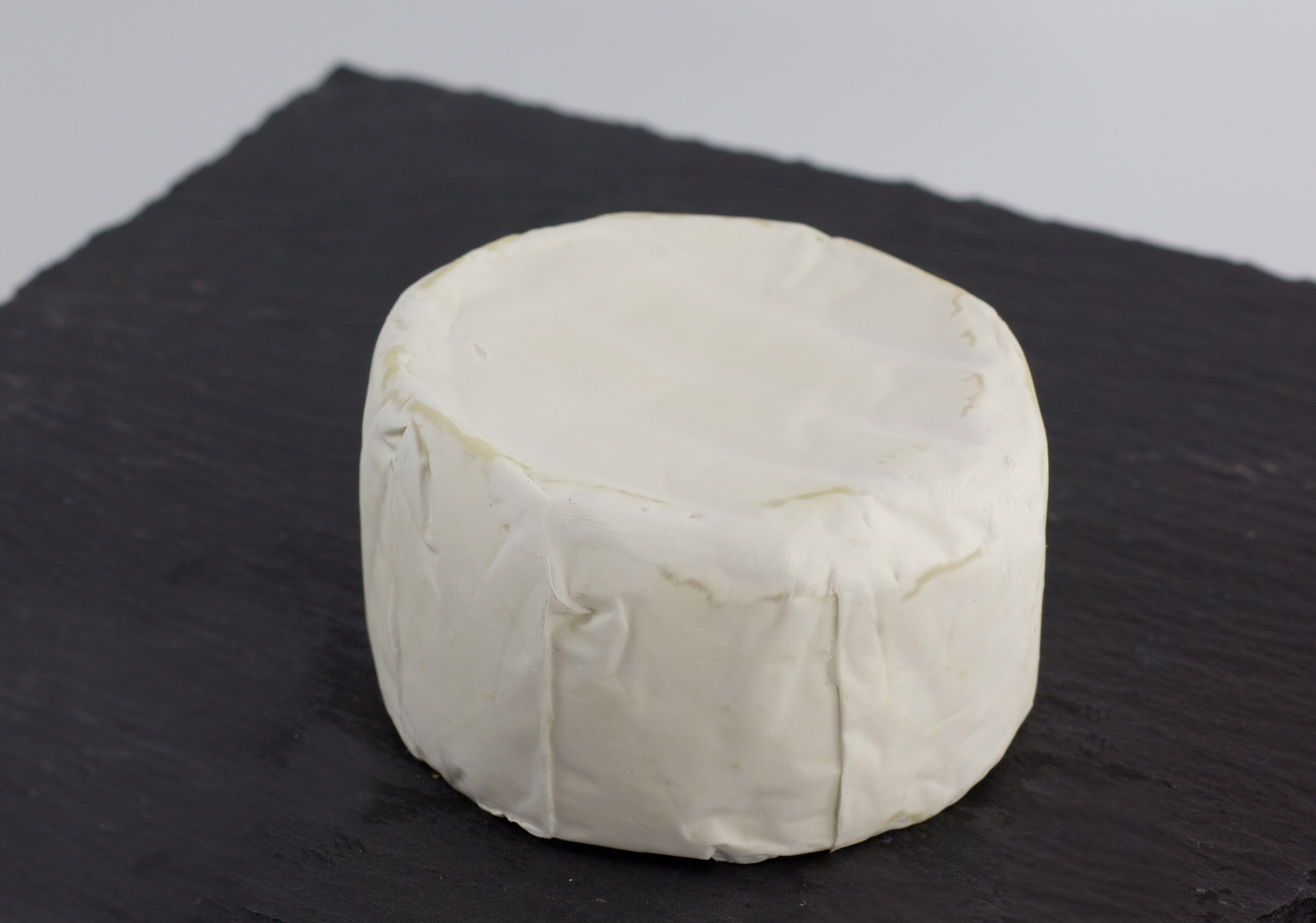 Bergader Almkäse Chili